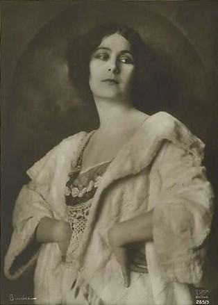 Porträt der Schauspielerin Lil Dagover